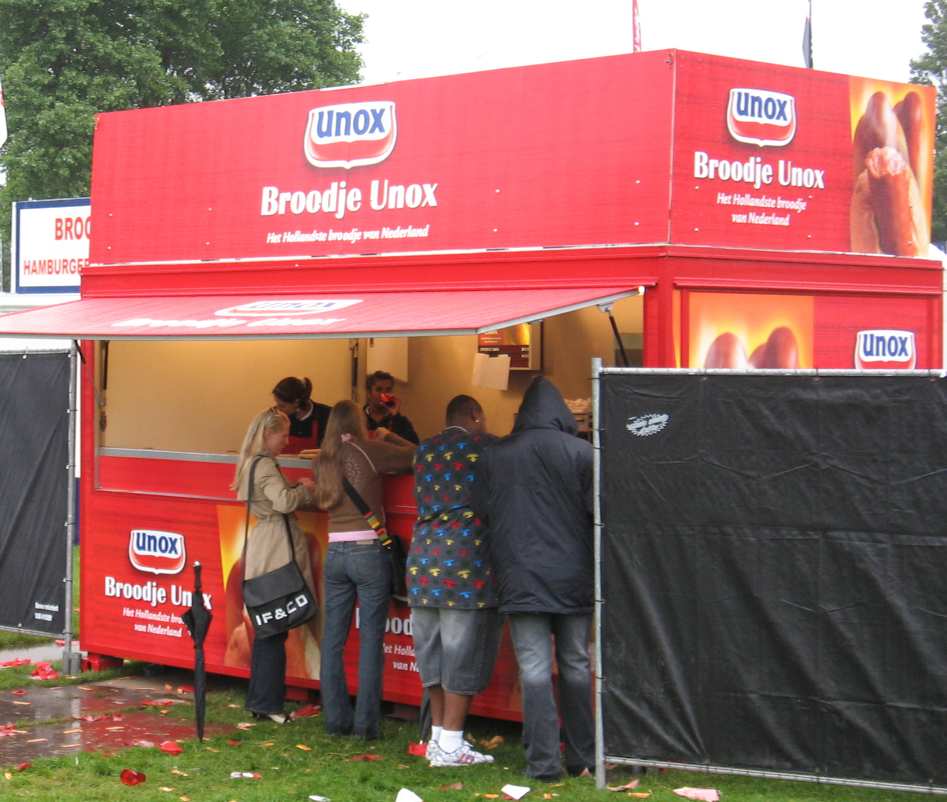 Unox op parkpop, Den Haag